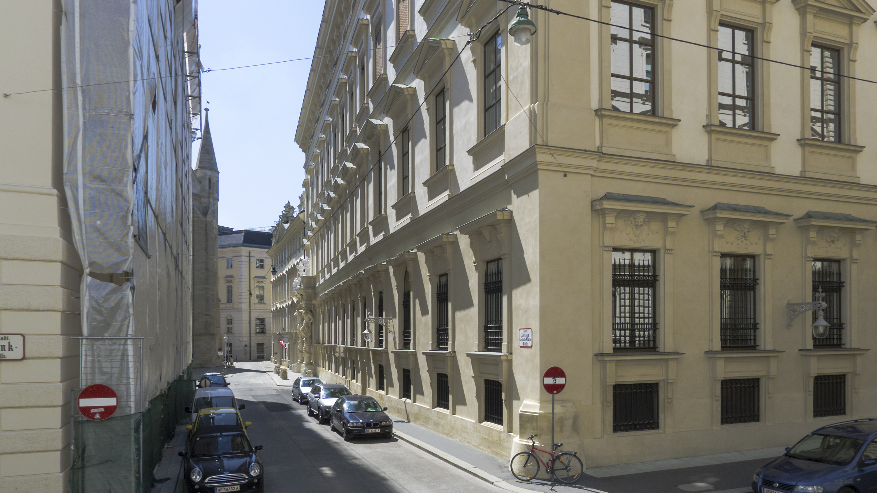 Abraham-a-Sancta-Clara-Gasse in Wien 1 bei der Bankgasse Richtung Südosten